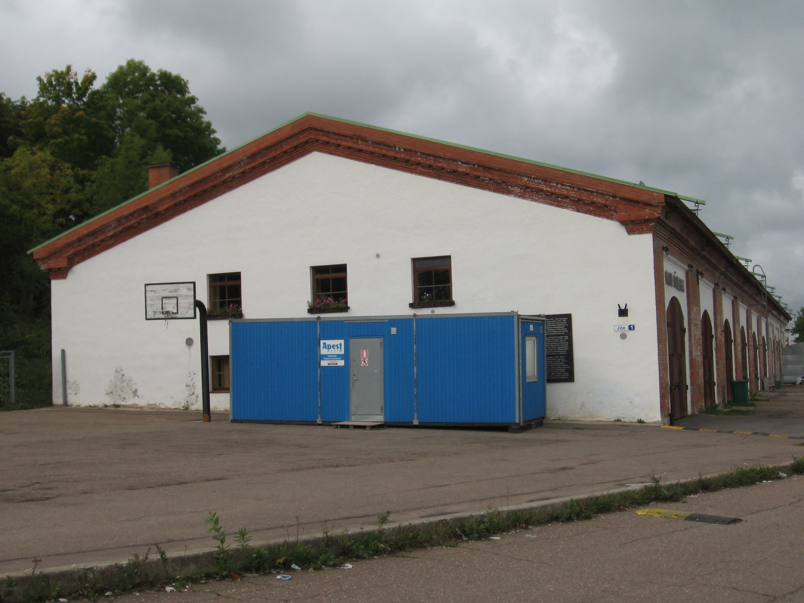 Kreenholmi sadamalaod